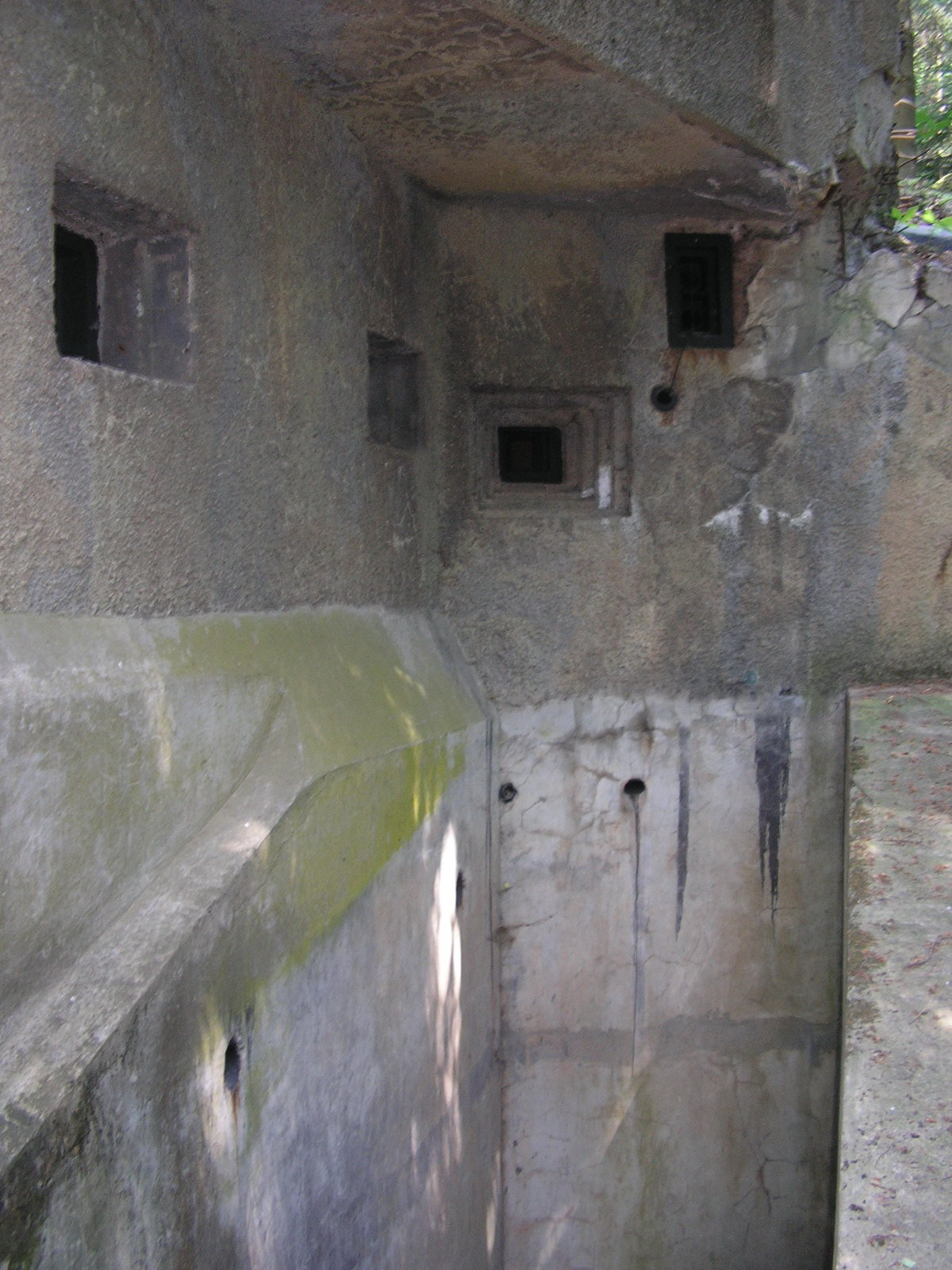 Granátový skluz umístěný pod střílnami (N-S 81 Lom)